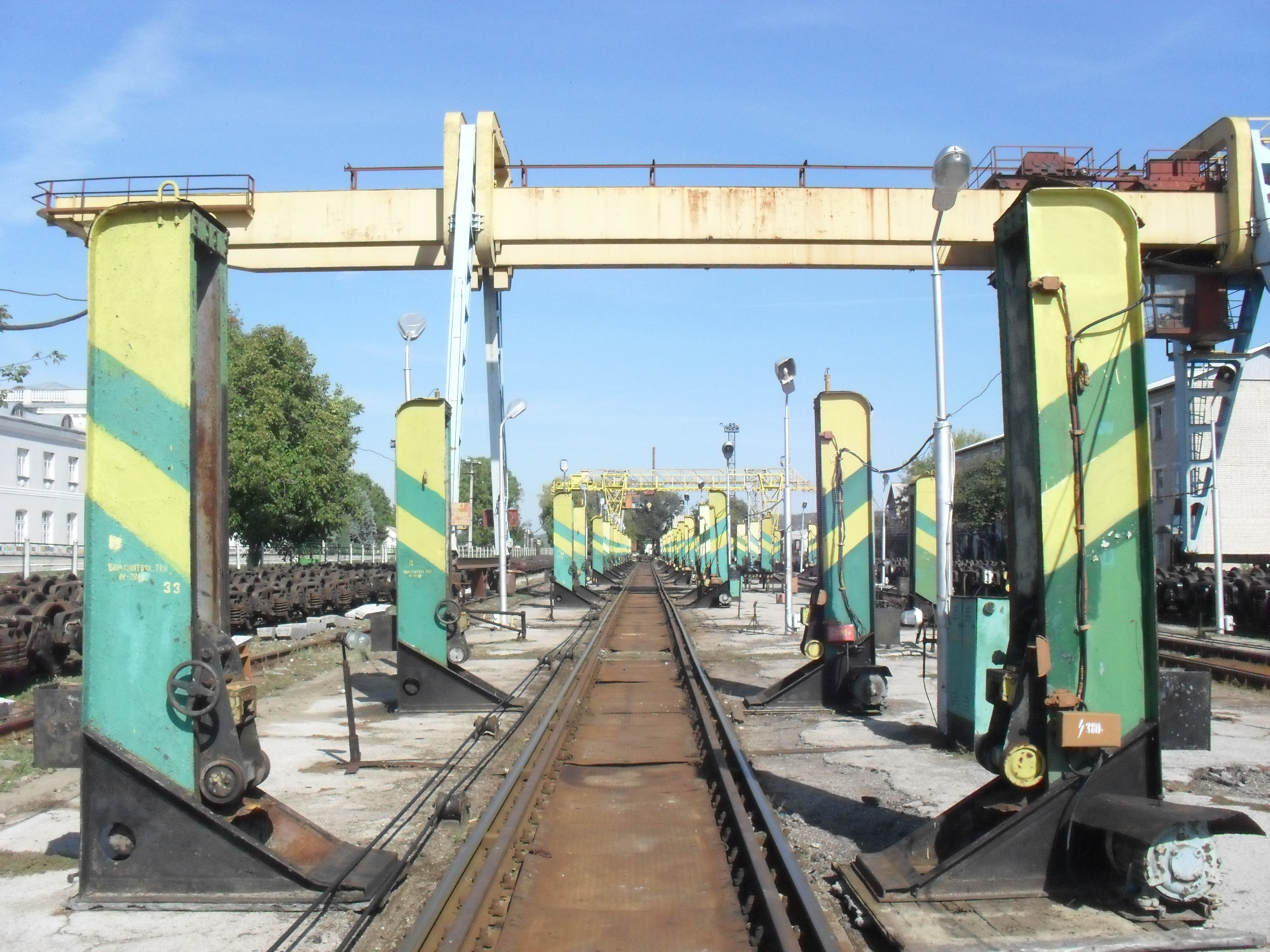 Обеспечивает беспересадочную и бесперегрузочную перестановку пассажирских и грузовых вагонов.